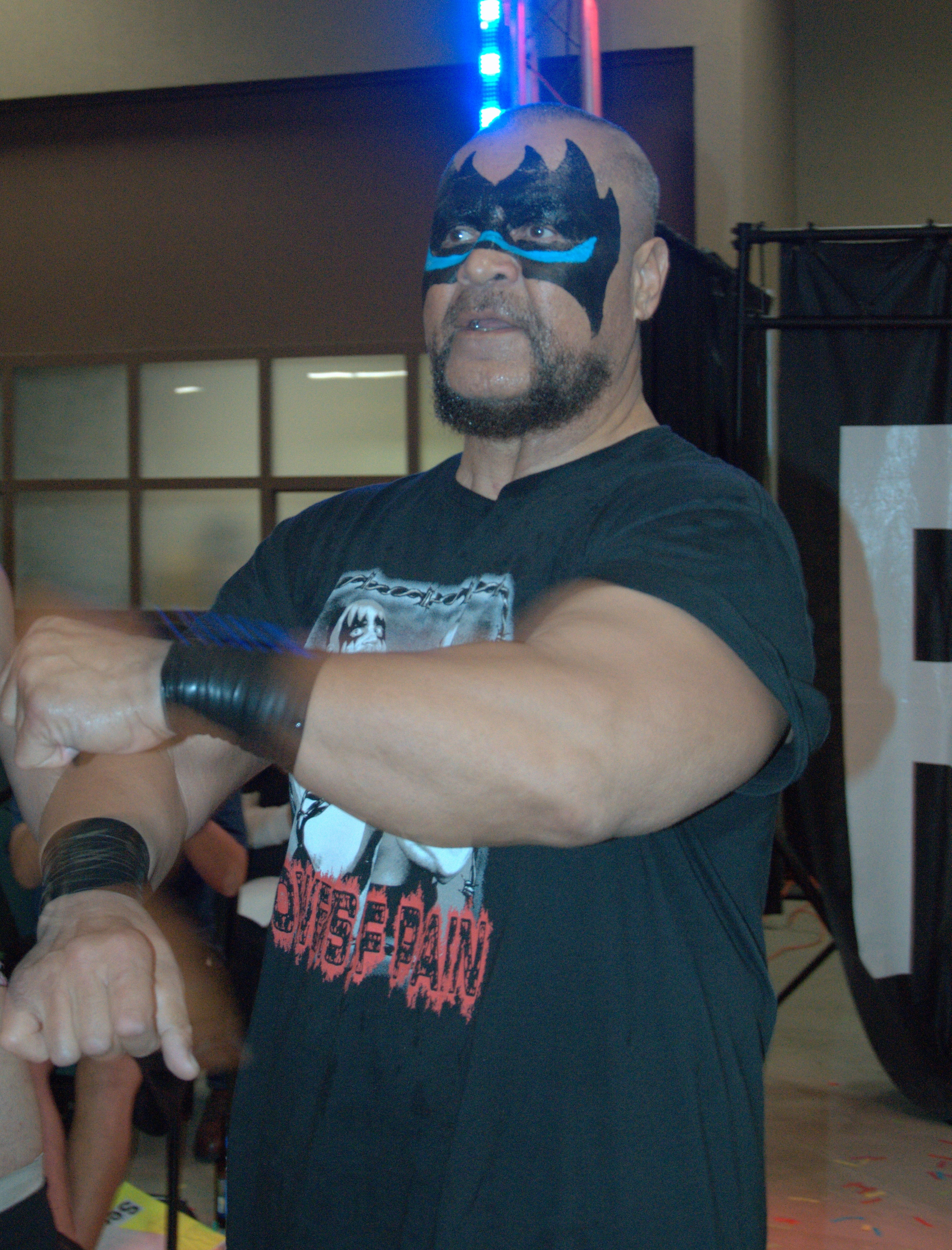 Le catcheur The Barbarian en 2017